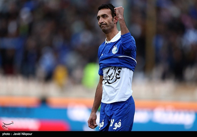 دیدار تیم های فوتبال استقلال تهران و سپاهان اصفهان در بهمن ۱۳۹۳ که در آن استقلال با گل ثانیه‌های پایانی امید ابراهیمی توانست پیروز مسابقه شود. (گزارش بازی)